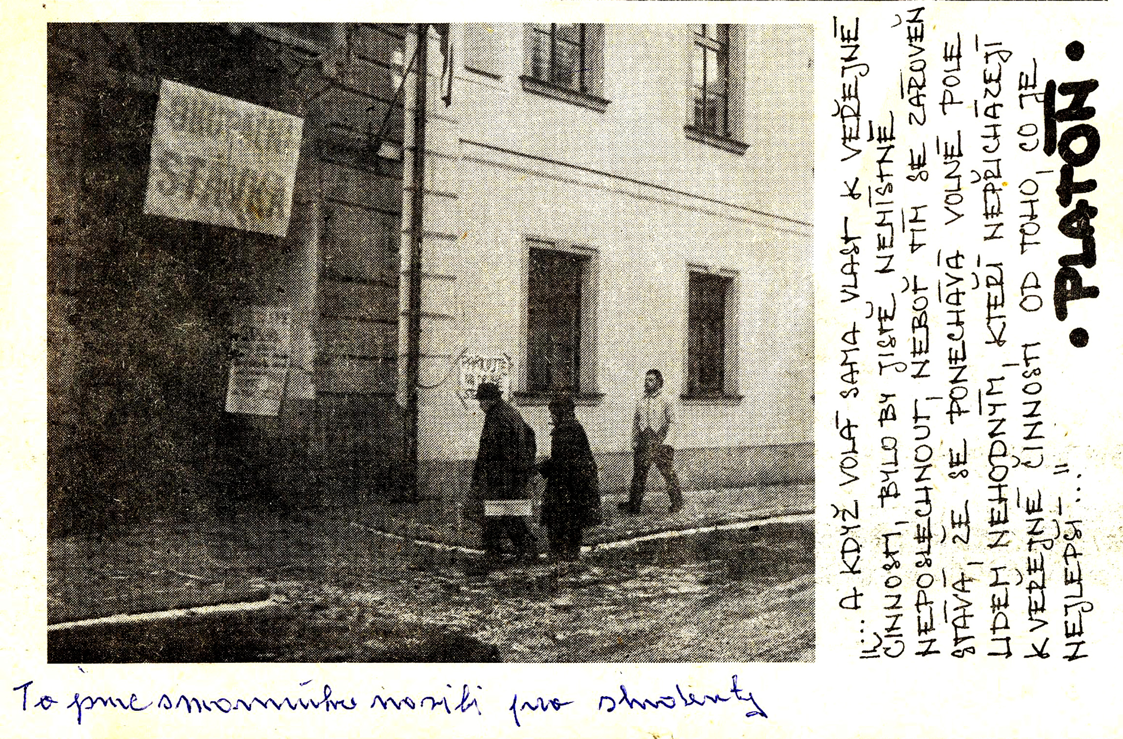 Josef Štafl s manželkou zásobují olomoucké studenty při okupační stávce